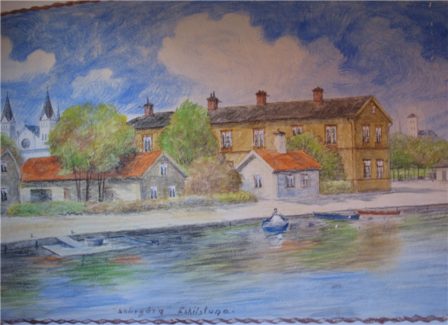 Fresk av Einar Hillberg föreställande "Skärgården" i Eskilstuna. En av de fresker som Einar Hillberg målade i sin sons, Ove Hillbergs, nybyggda hus i Eskiltuna 1953.